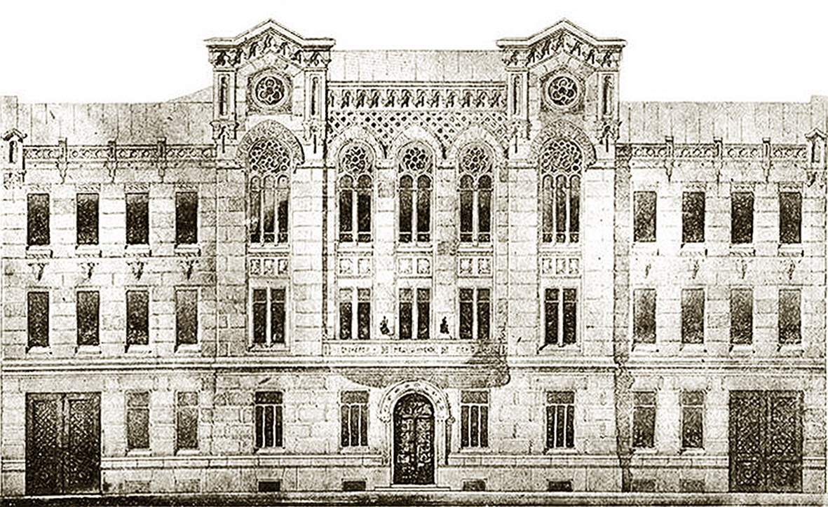 Садиба товариства швидкої медичної допомоги, Київ, вул. Рейтарська, 22